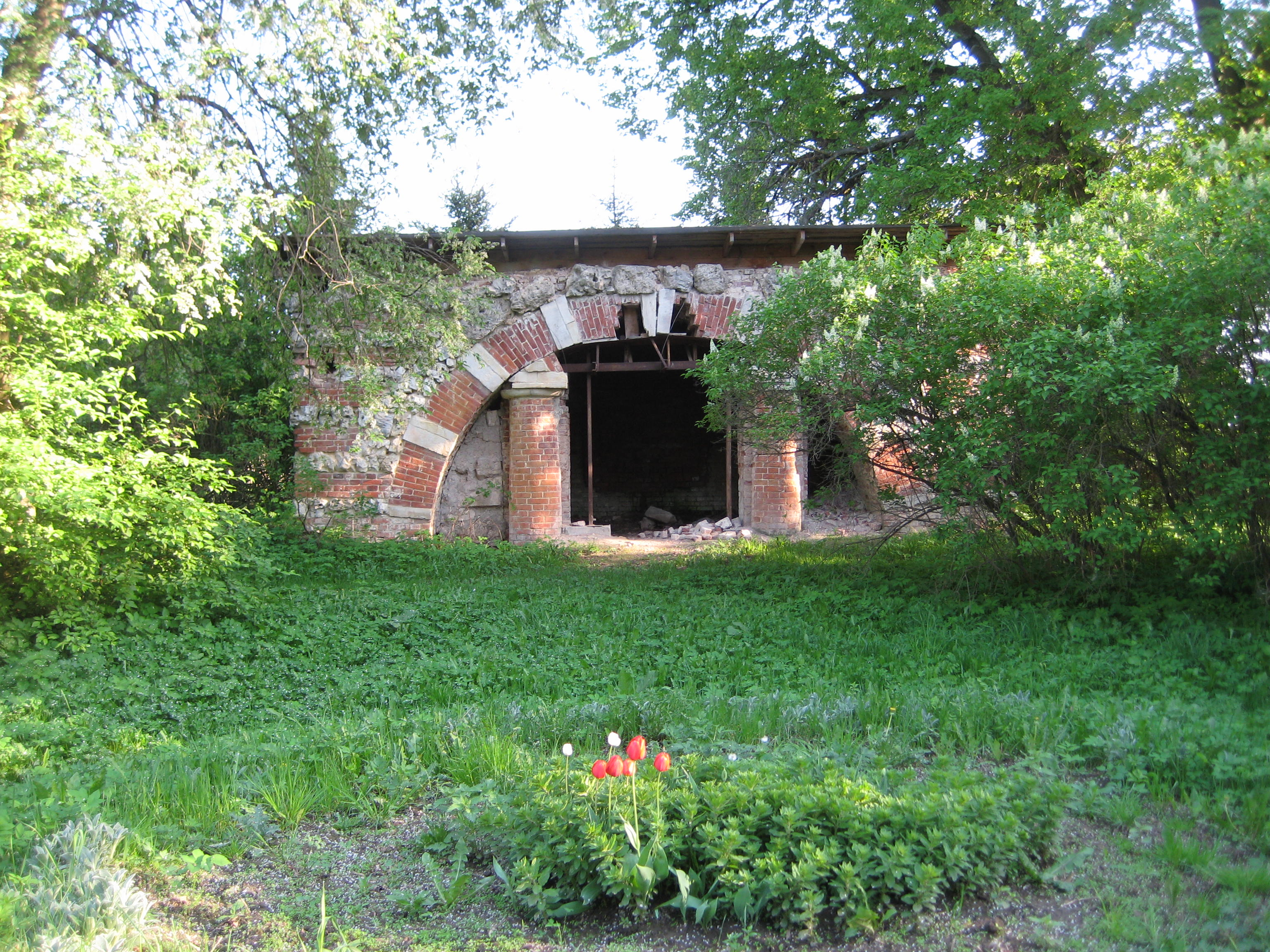 Грот в Истомино